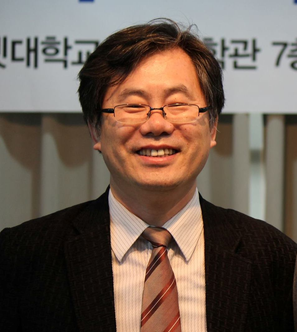 황덕형 박사 한국조직신학회 회장